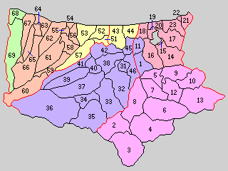 後の鳥取県東伯郡域の町村制時点の町村。